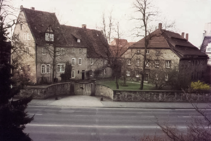 Der Redenhof in Hameln, seit 1568 im Besitz der Herren von Reden